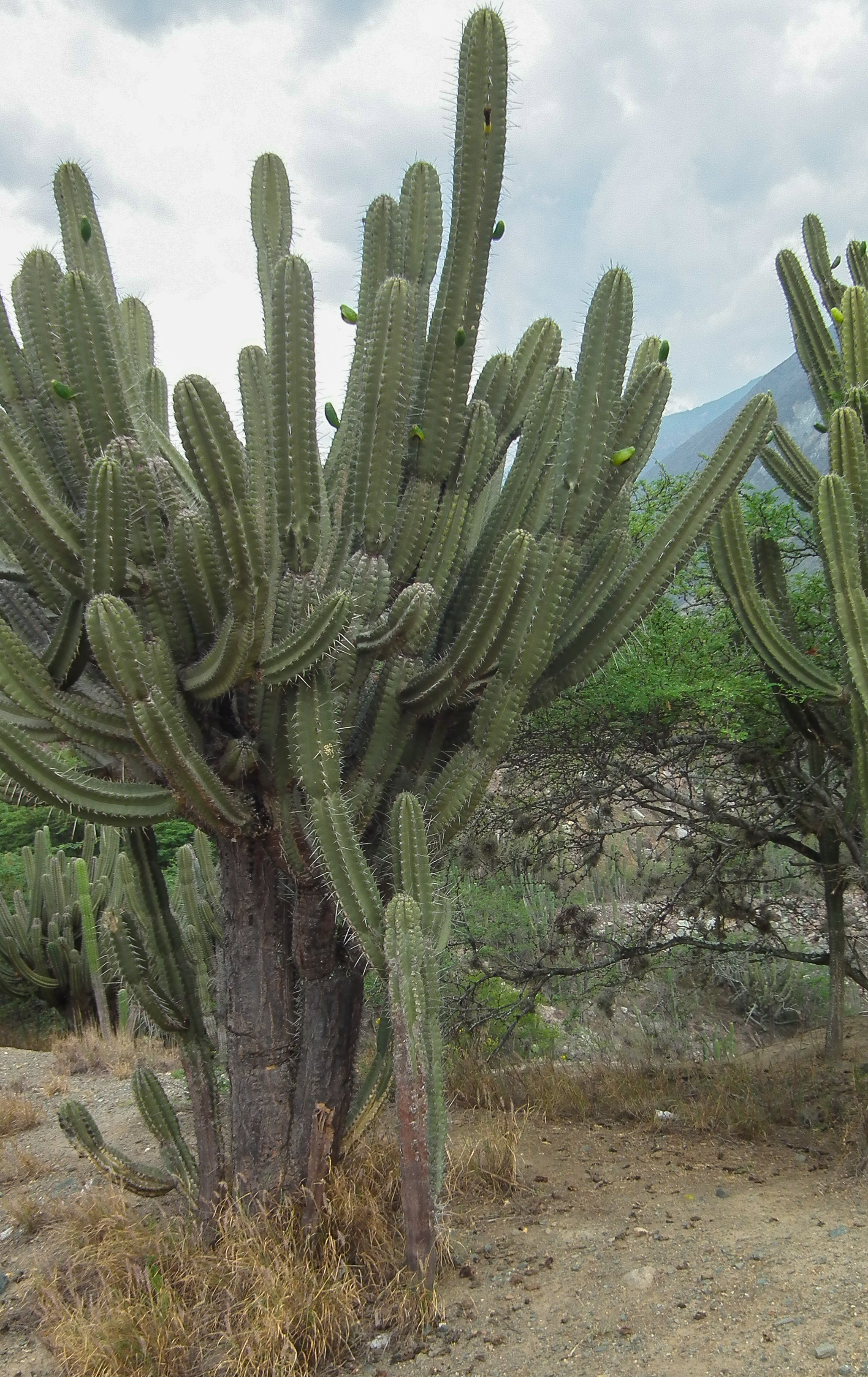 Paisaje Carretera El Vigia - Merdida